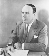 Senator George L. Berry (D-TN)